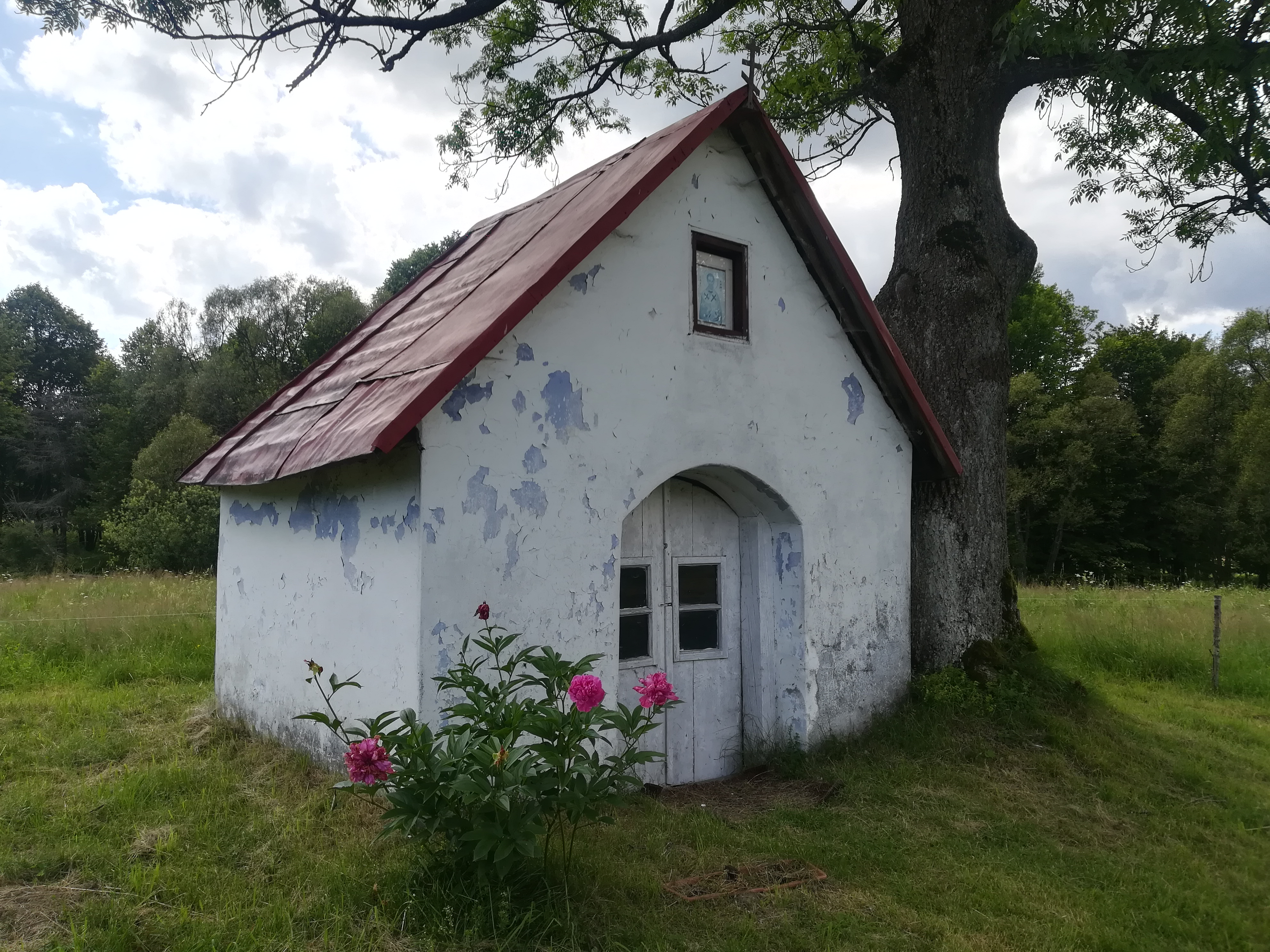 Krajobraz ze wsi Blechnarka w Beskidzie Niskim.